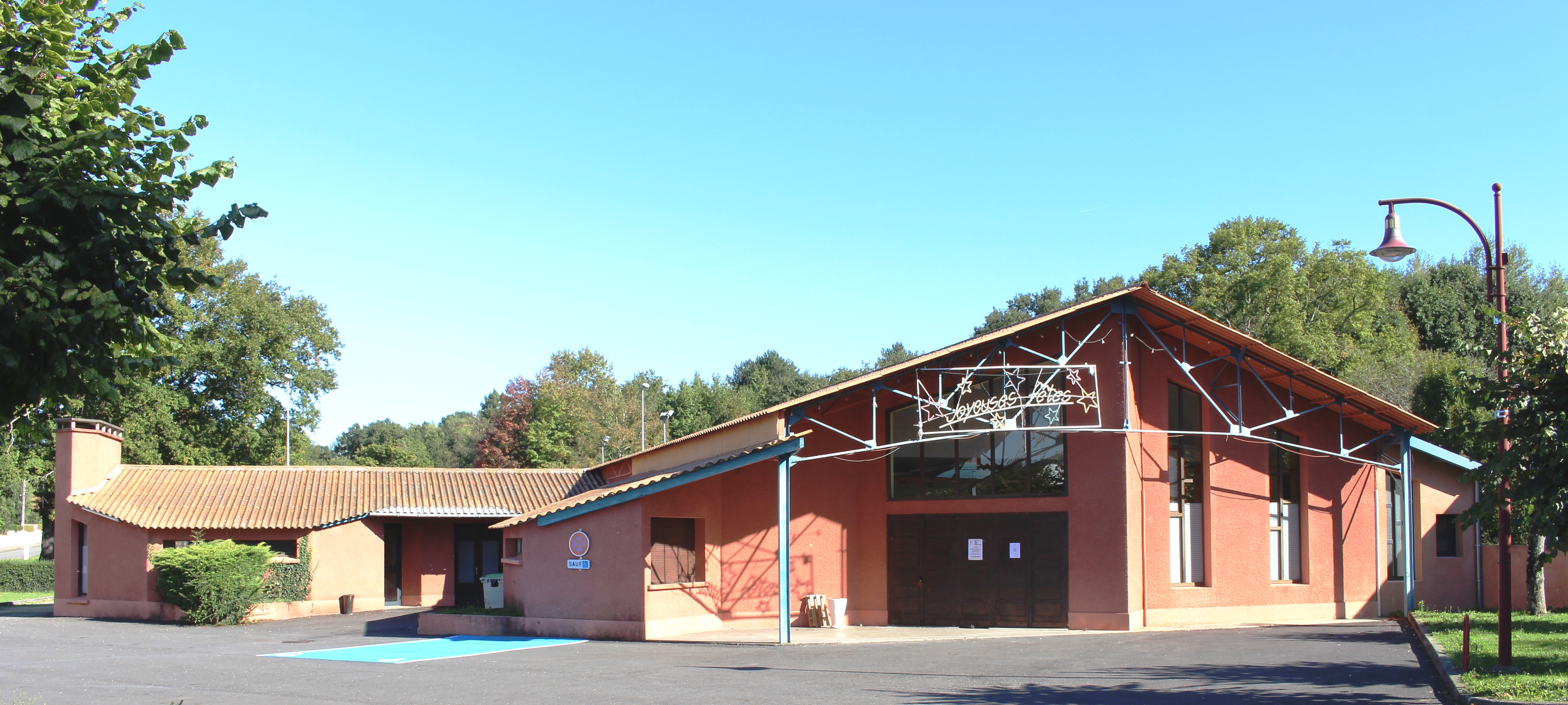 Salle des fêtes de Cantaous (Hautes-Pyrénées)